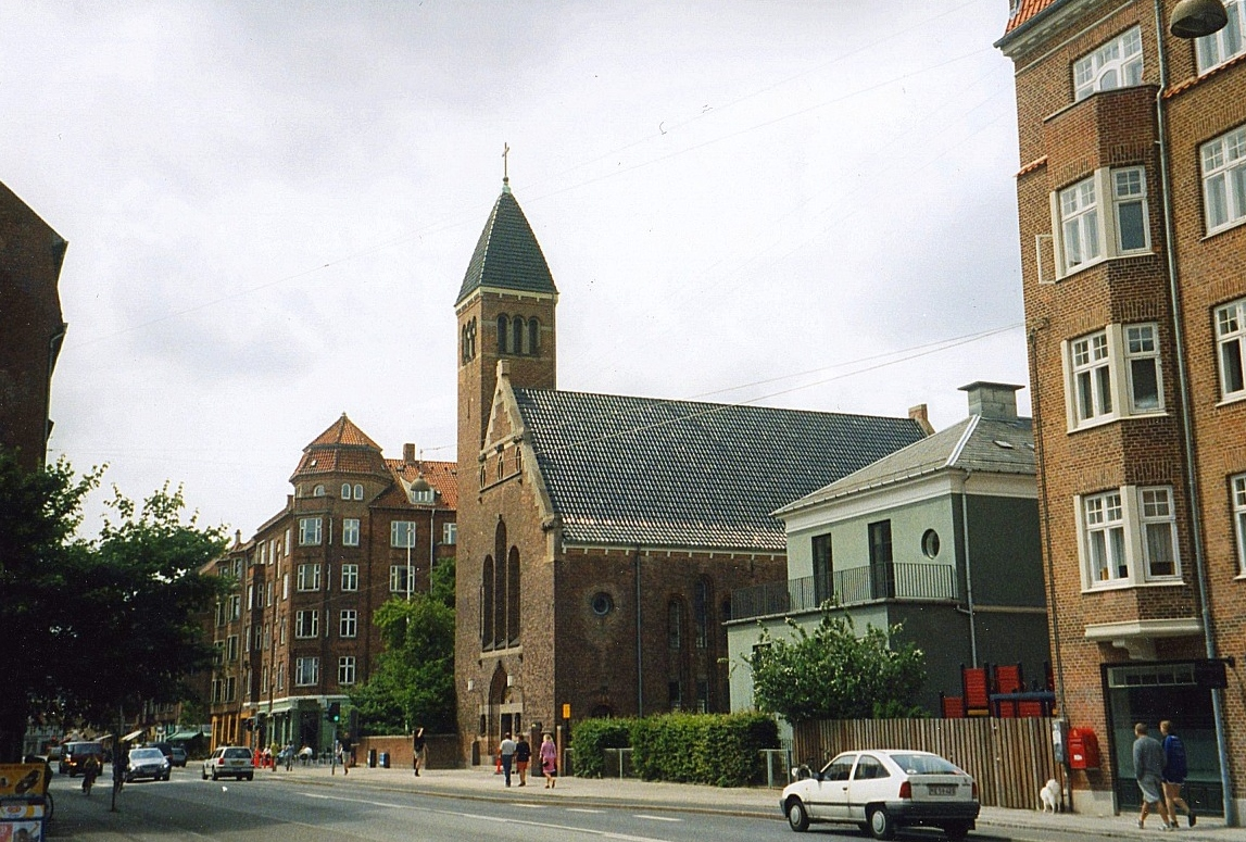 nathanaels Kirke, Nathanaels Sogn, Københavns Kommune